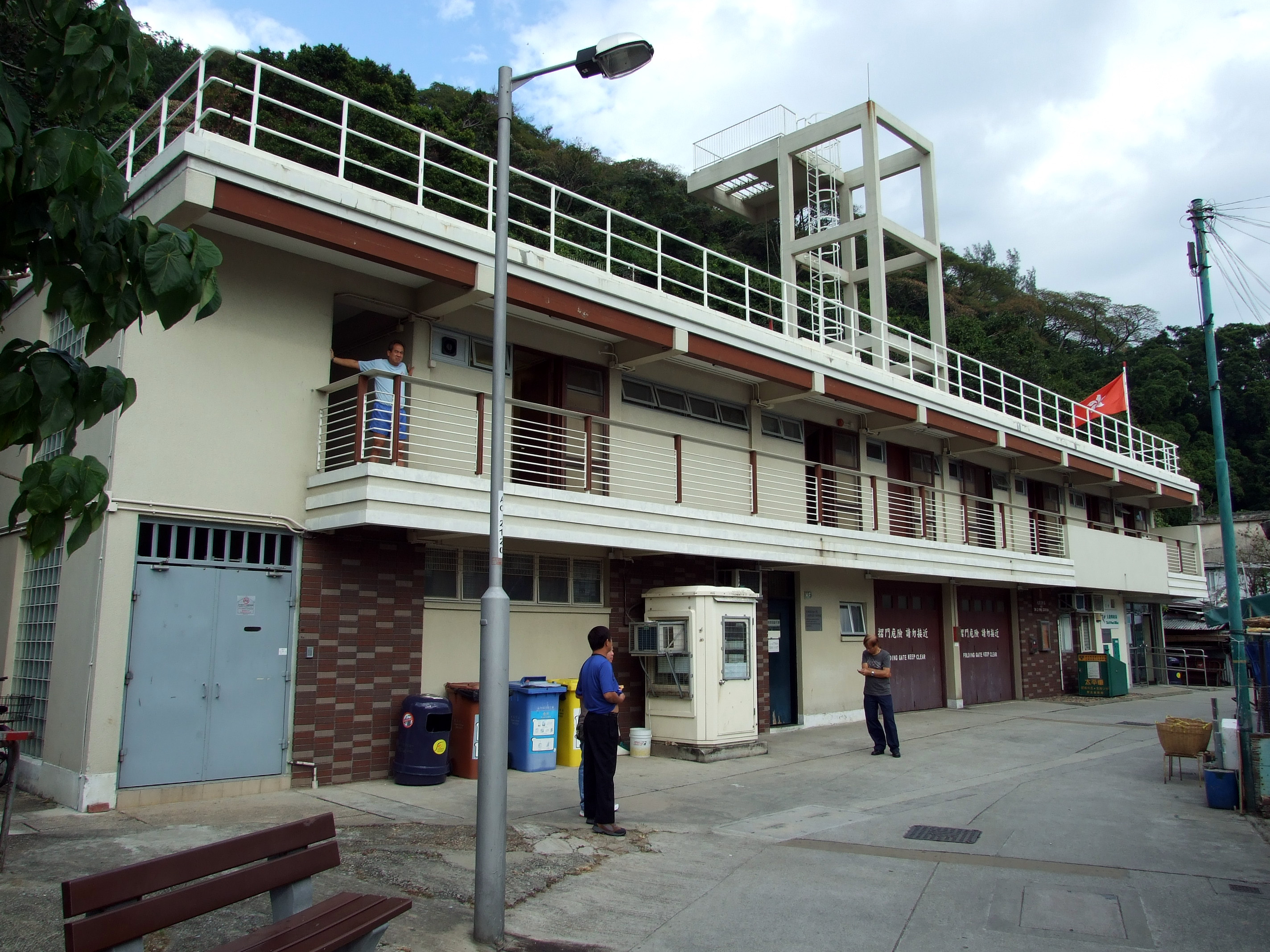 中文（香港）: 大澳（舊）消防局